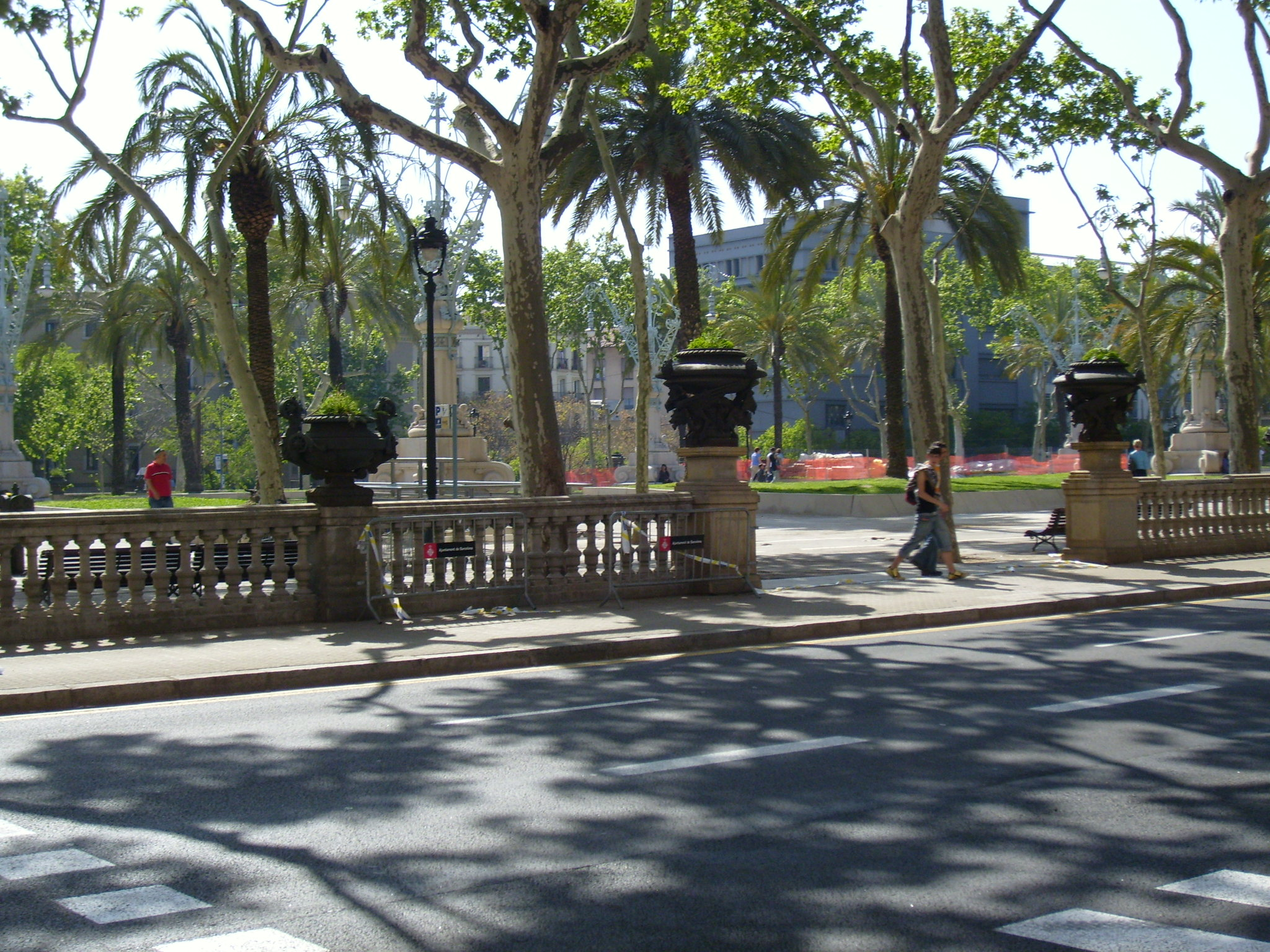 Passeig de Lluís Companys